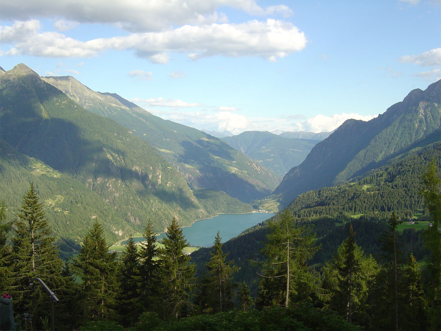 Der Lago di Poschiavo von der Alp Plaz Gervas aus gesehen